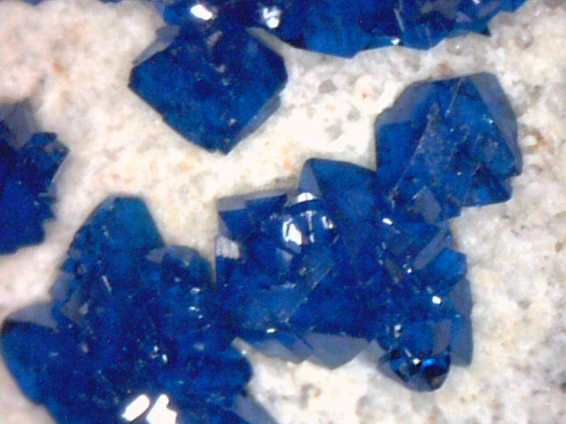 Cornetit bei ca. 200-facher Vergrößerung